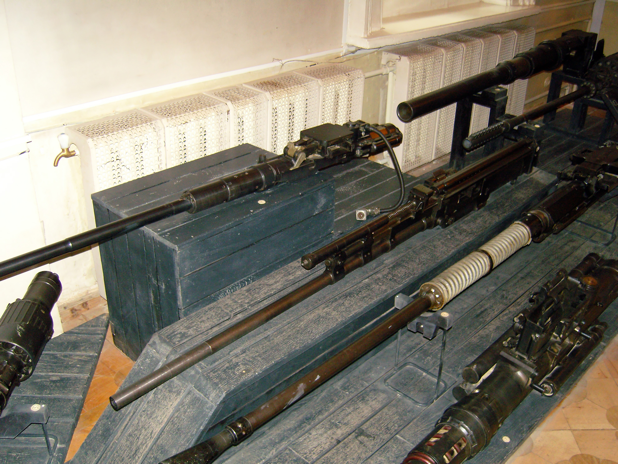 Авиационные пушки и пулеметы 30-50-ых годов (Avia cannons and machineguns from 30s-50s)